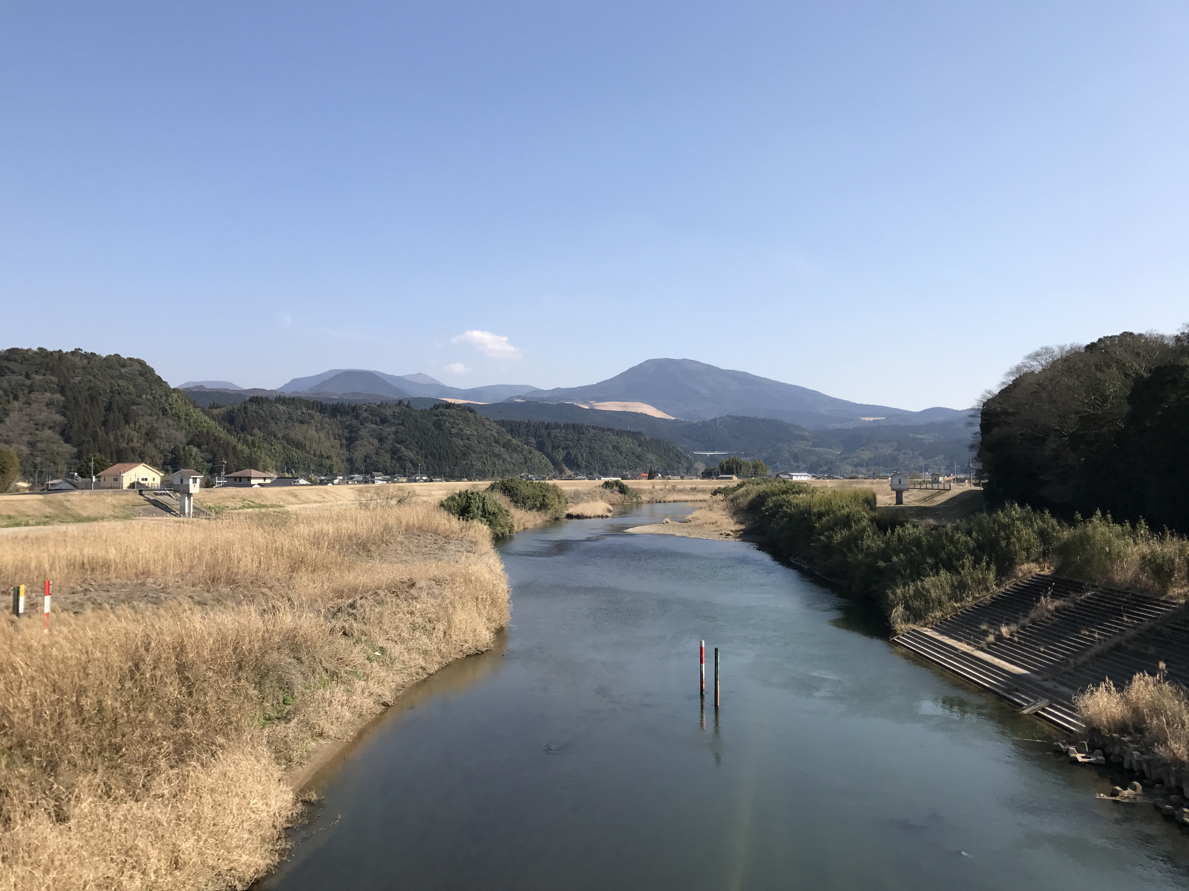 吉松橋歩道橋より望む川内川(下流側)